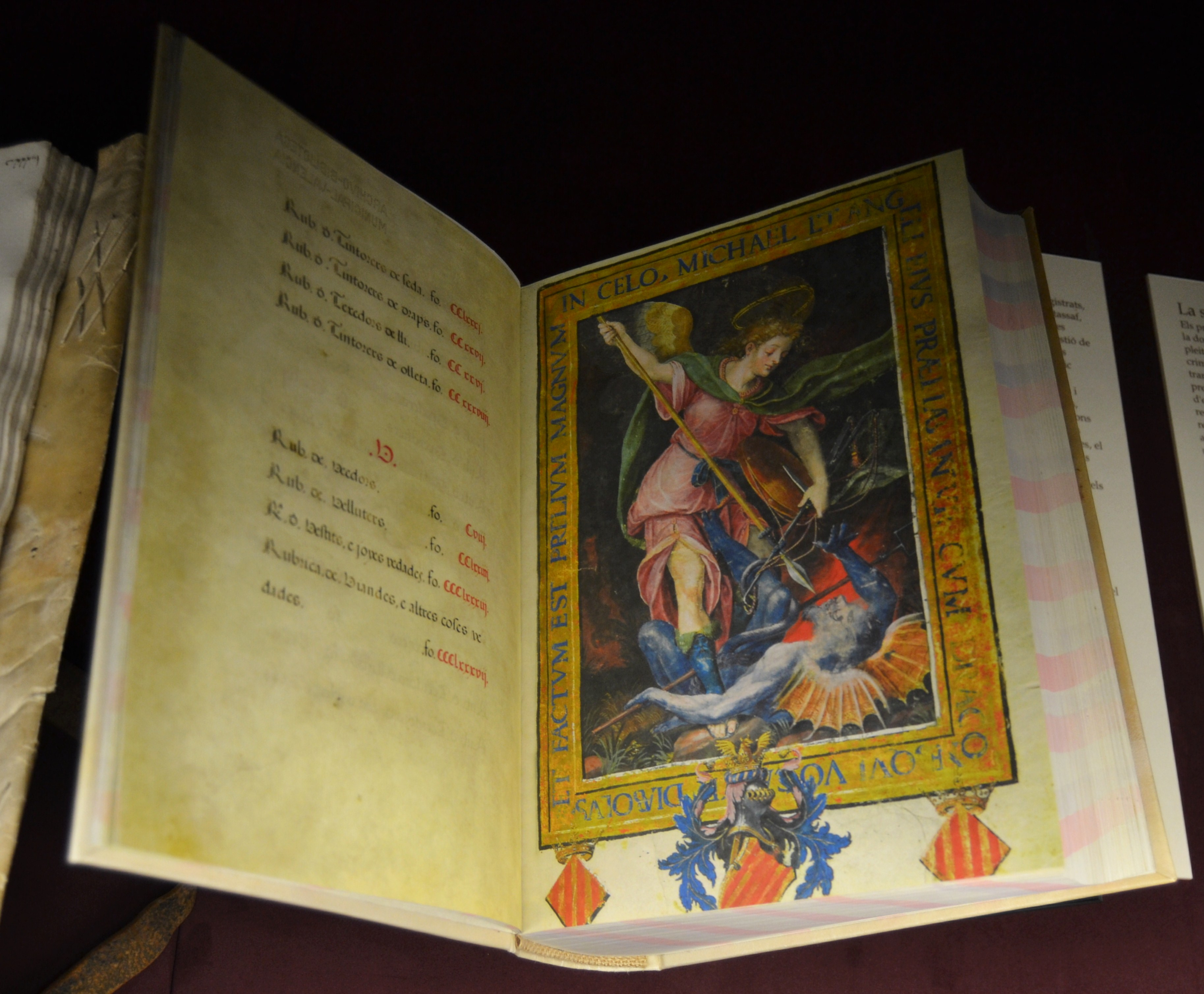 Llibre del Mostassaf, palau de Cervelló de València. El mostassaf va ser una institució d'origen islàmic adoptada per a la salvaguarda de les ordenances sobre les activitats mercantils i artesanals, control de pesos i mesures, policia urbana, neteja i salubritat pública. Aquesta compilació de normes reguladores de l'ofici, realitzada entre 1563 i 1568, està il·lustrada amb la imatge de sant Miquel Arcàngel, festivitat en què es renovava l'oficialia. arxiu Municipal de València, còdex 4, folis 6v-7.